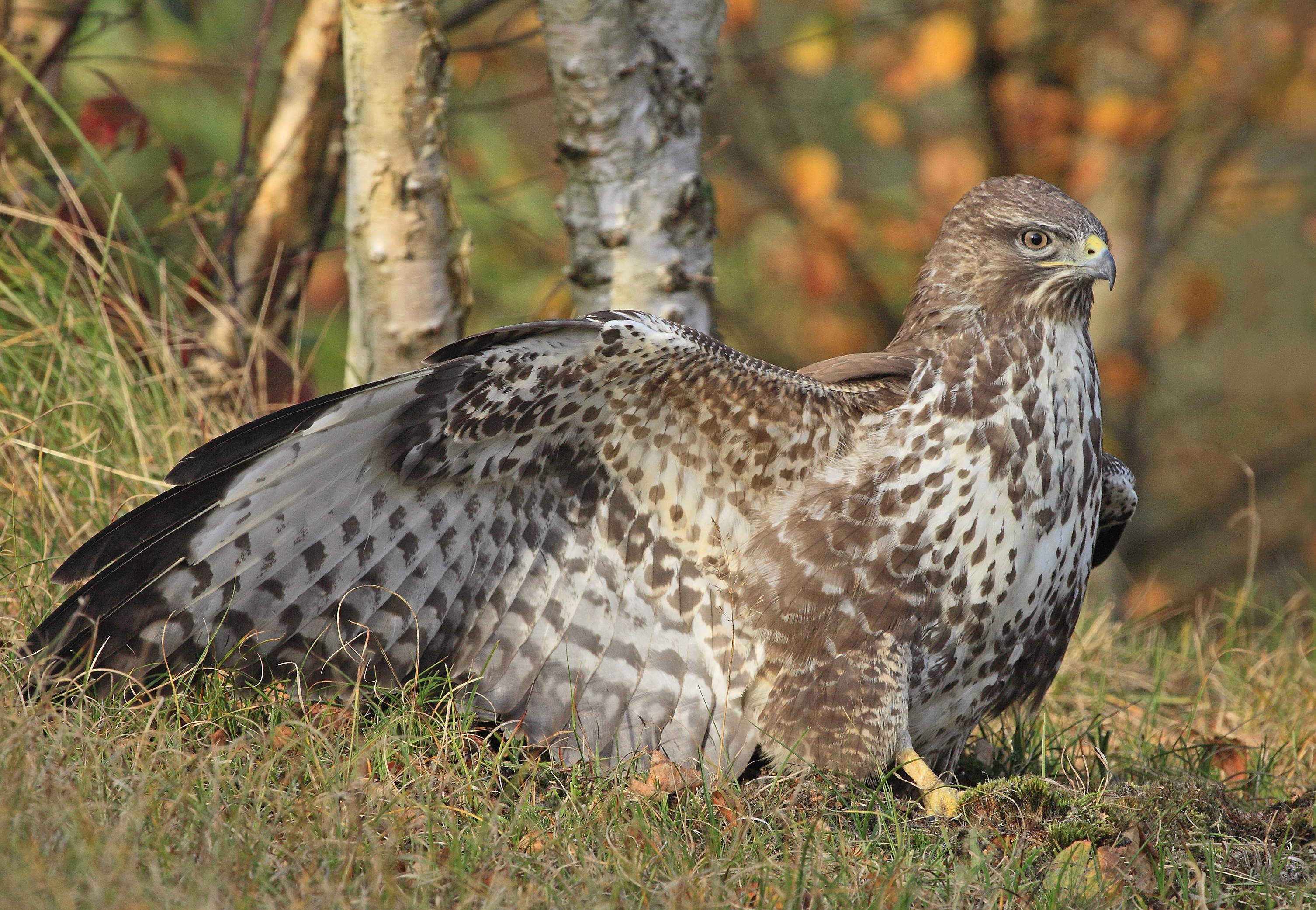 Een jonge buizerd horend bij een buizerdvrouwtje dat ik 7 jaar lang heb gevolgd en gefotografeerd in de Kooiduinen. This is a photo or sound file made in Schiermonnikoog National Park in the Netherlands, with the main subject of the file in the category: animals